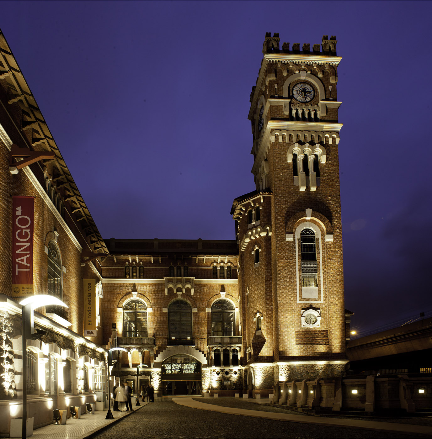 Buenos Aires, 23 de Mayo de 2012. El jefe de Gobierno Mauricio Macri inagura la Usina de las Artes, un espacio cultural ubicado en pleno corazón de La Boca.